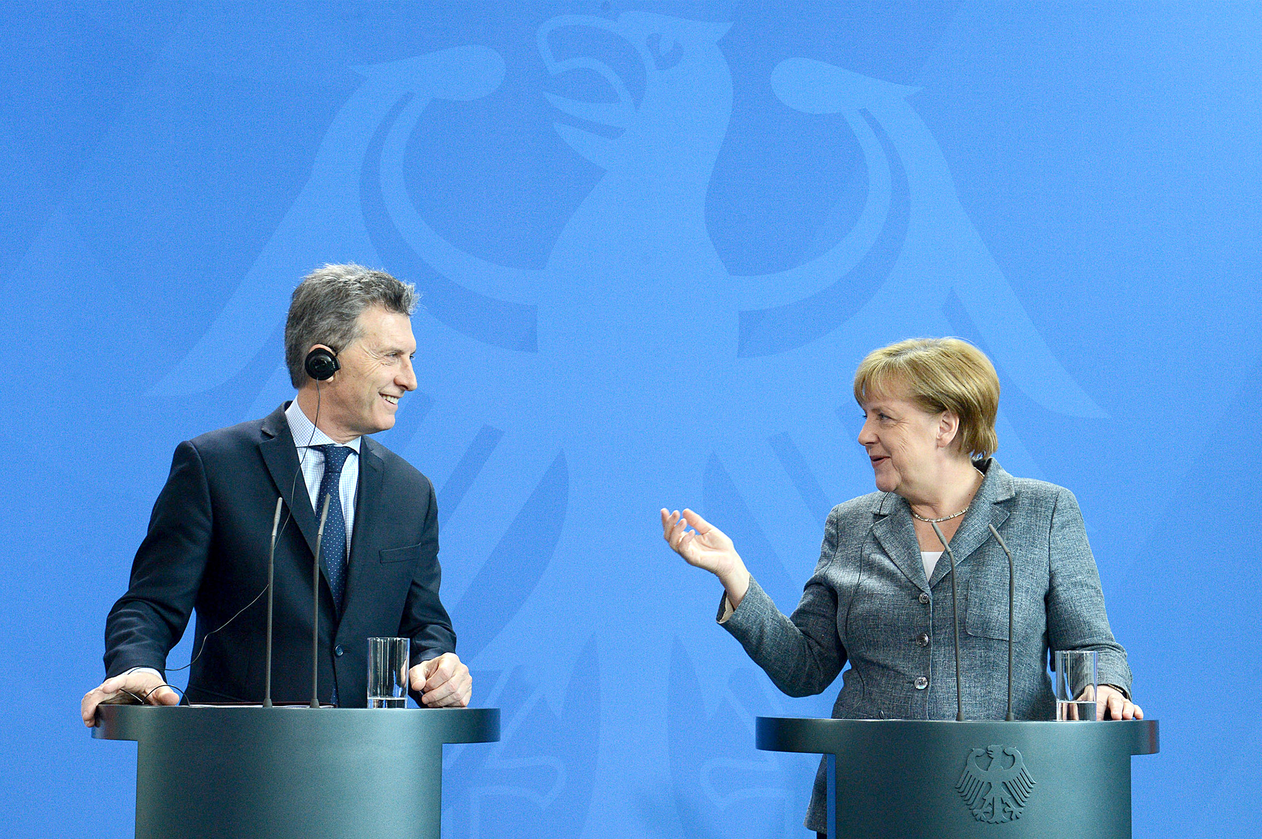 El presidente Mauricio Macri y la canciller federal Angela Merkel acordaron reforzar el trabajo conjunto y los vínculos de cooperación entre la Argentina y Alemania y reiteraron el compromiso de apoyar las negociaciones para avanzar hacia un acuerdo comercial entre el Mercosur y la Unión Europea.